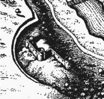 Václavský hrad - Cheb